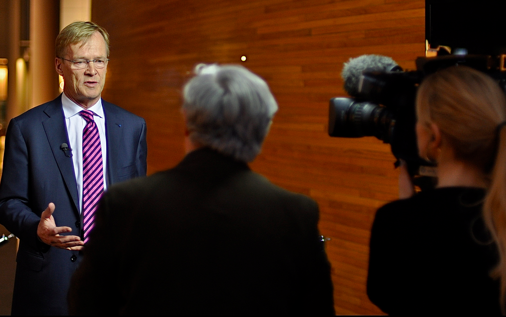 Ari Vatanen au parlement Europeen de Strasbourg